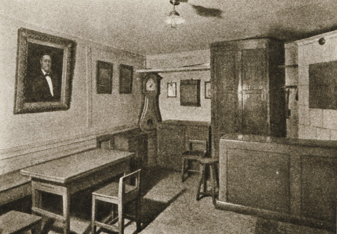 Vindragarnas härbärge i Gamla stan